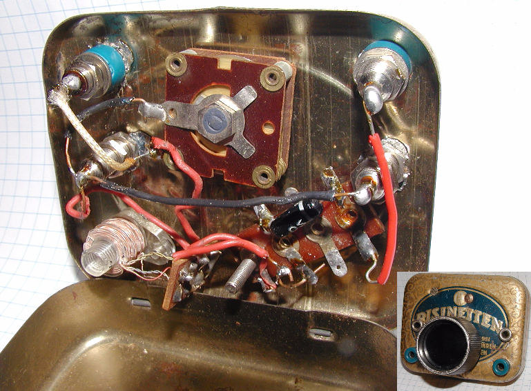 Selbstbau-Detektorempfänger, mit Diode als Gleichrichter, die an einem Spulenabgriff angeschlossen ist